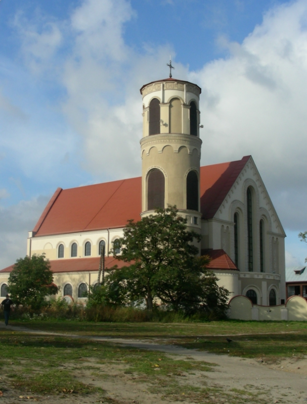 Kościół pw. Ofiarowania Pańskiego w Natolinie (Warszawa)